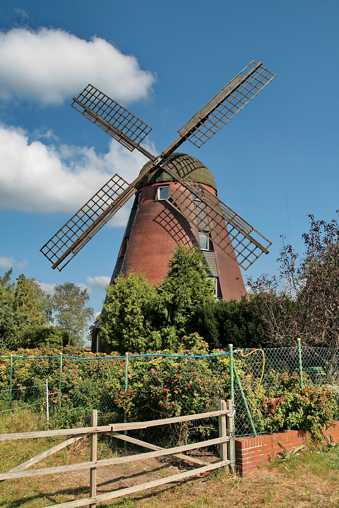 Windmühle in Vöhrum (Peine), Niedersachsen, Deutschland.